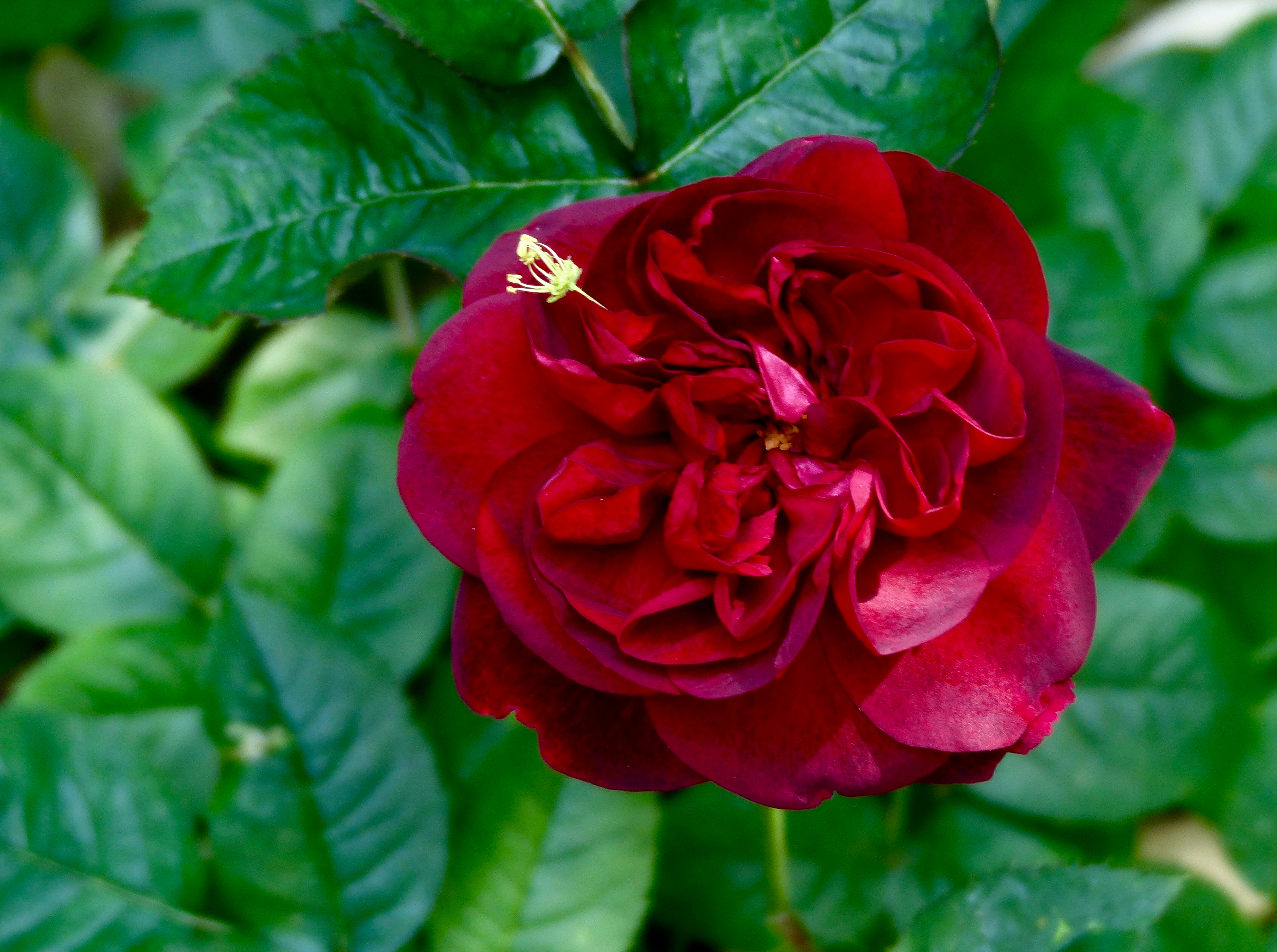 Rosa 'Darcey Bussell' , Mai 2017 in Köln